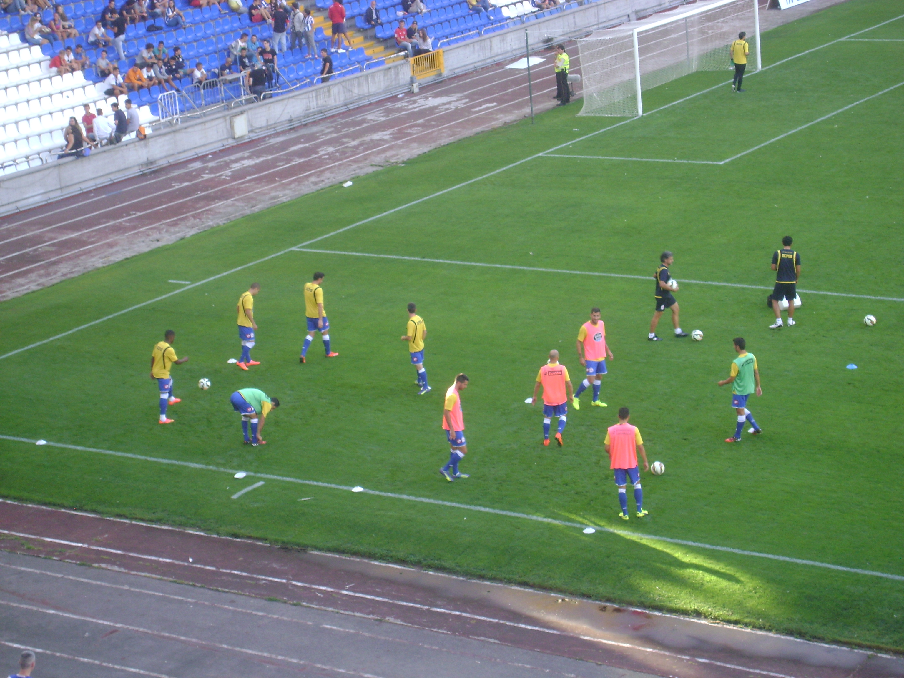 Jugadores del Deportivo de La Coruña. Temporada 14/15